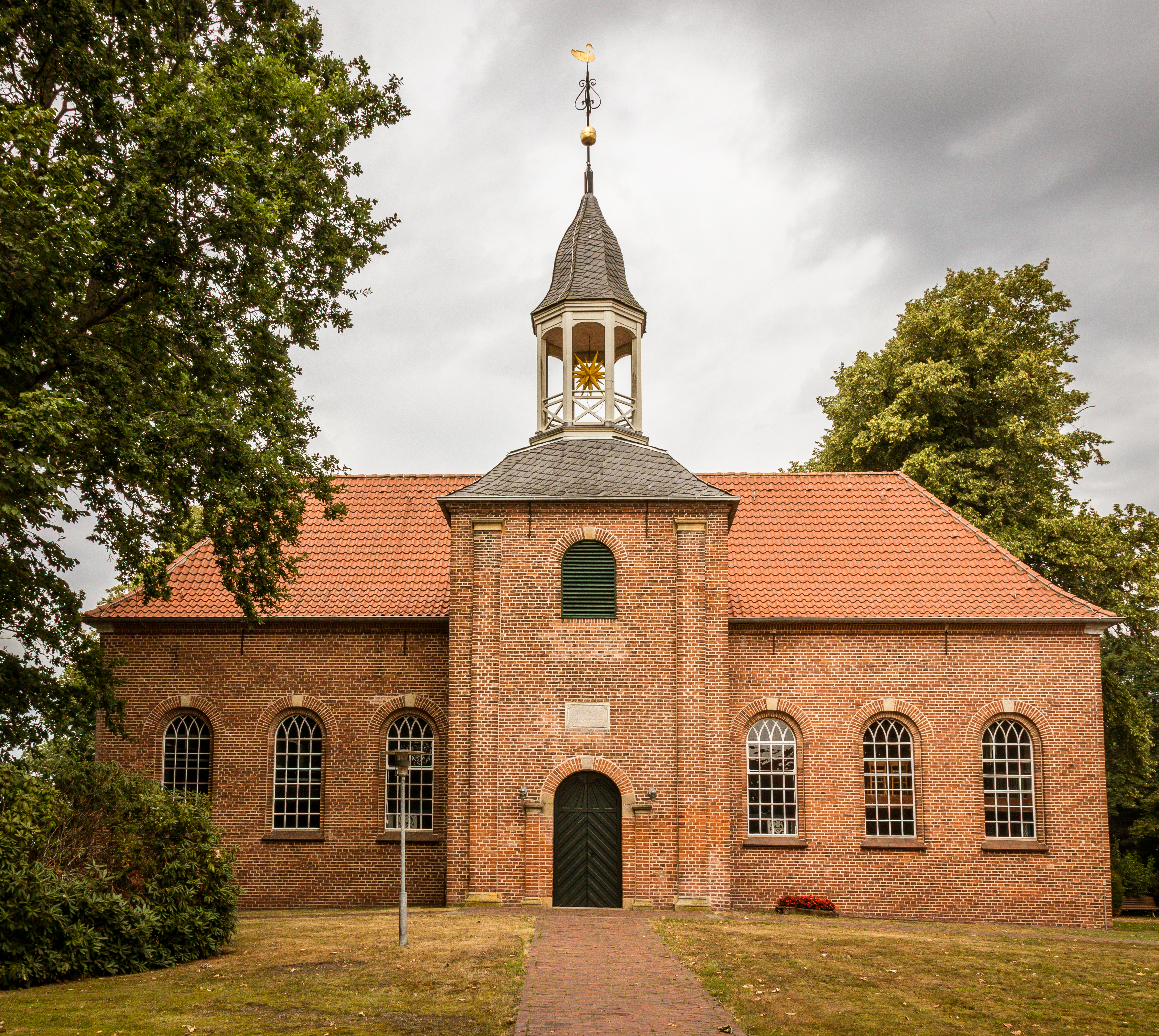 Ev.-luth. Kirche Hatshausen mit Glockenturm. Rechteckiger Saalbau in Ziegelbauweise. Vor der südlichen Traufseite Glockenturm. Datiert 1783.